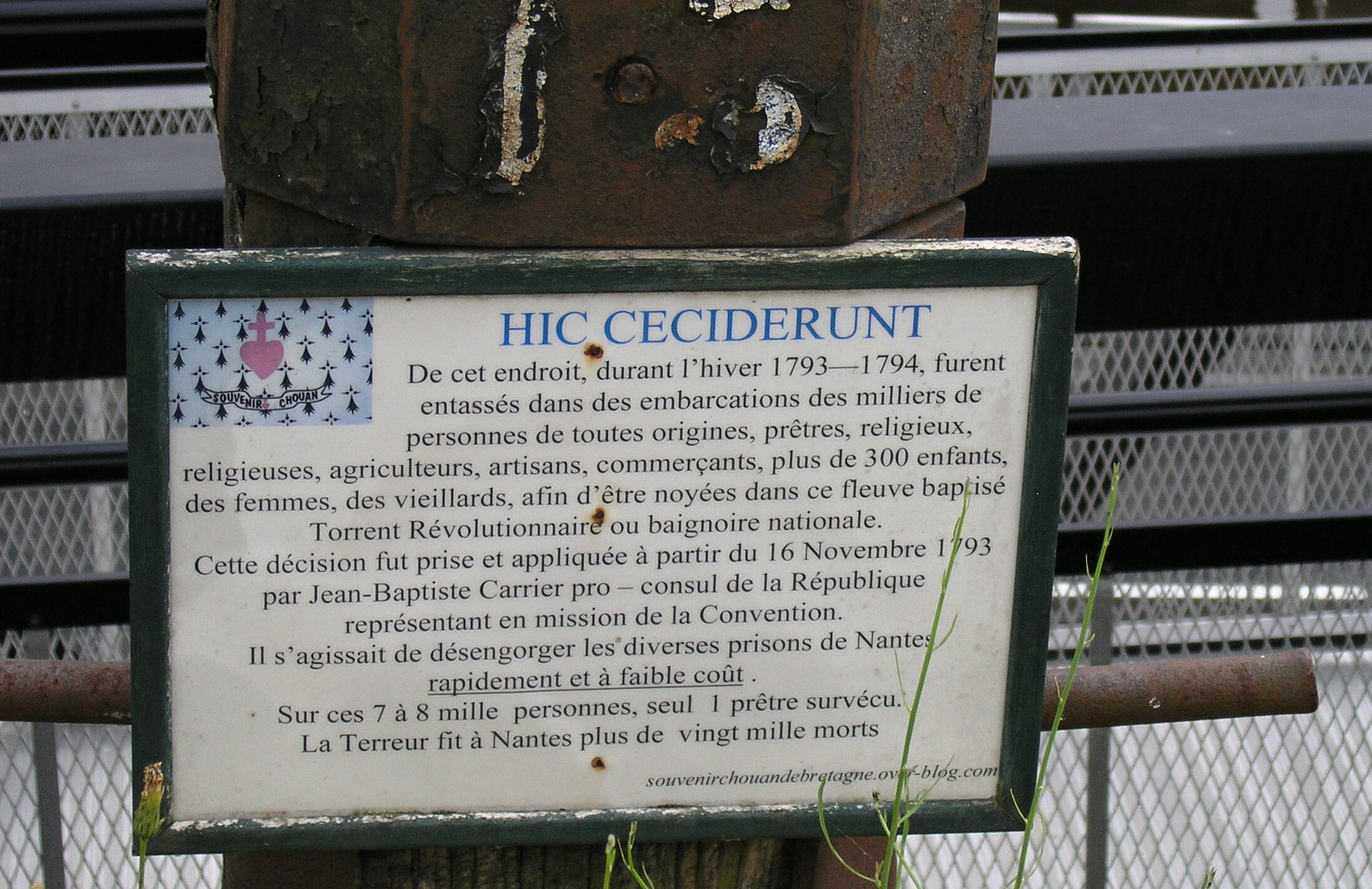 Ici sont décédés.....